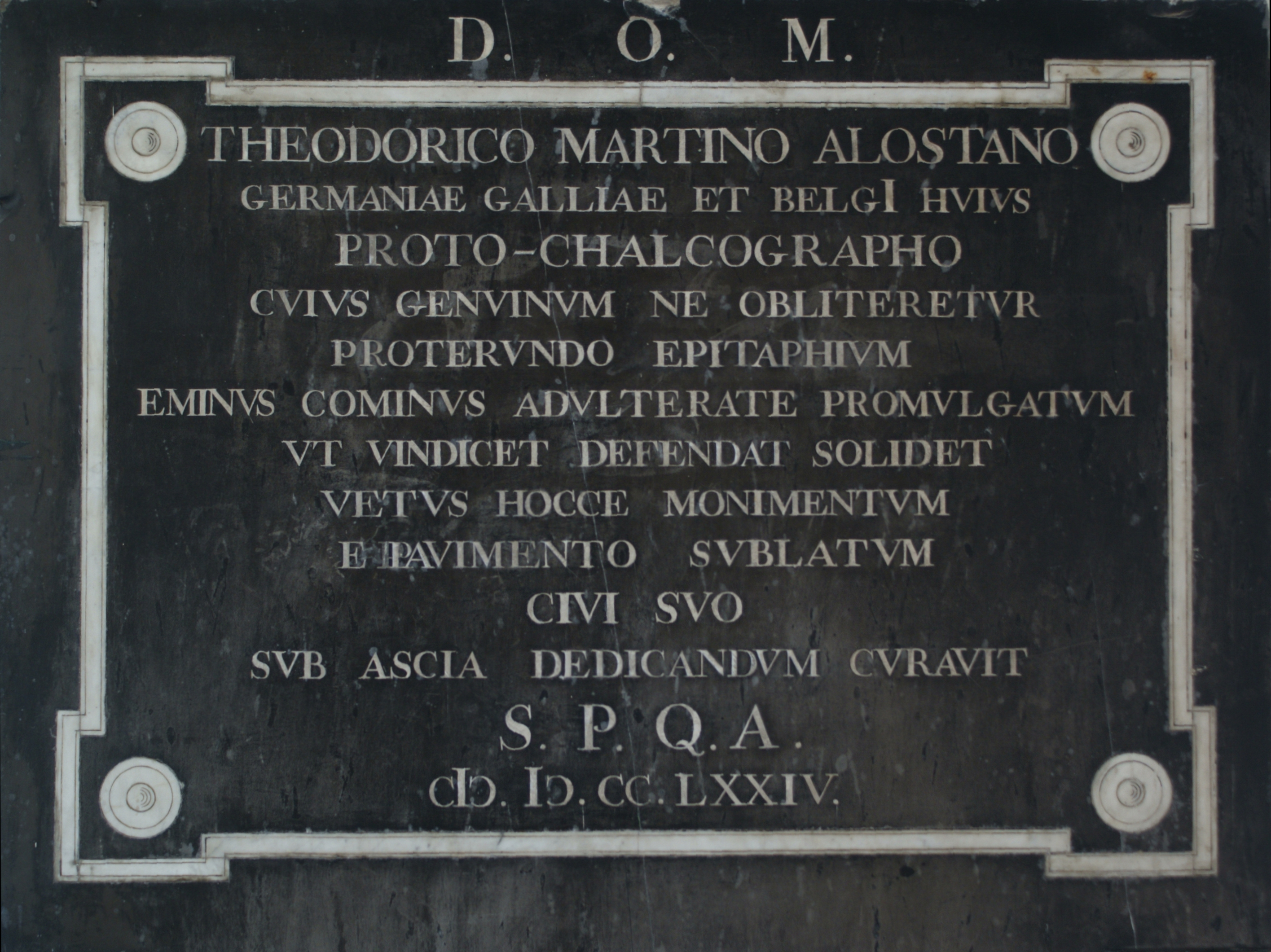 Sint-Martinuskerk (Aalst) - Gedenksteen van Dierick Martens